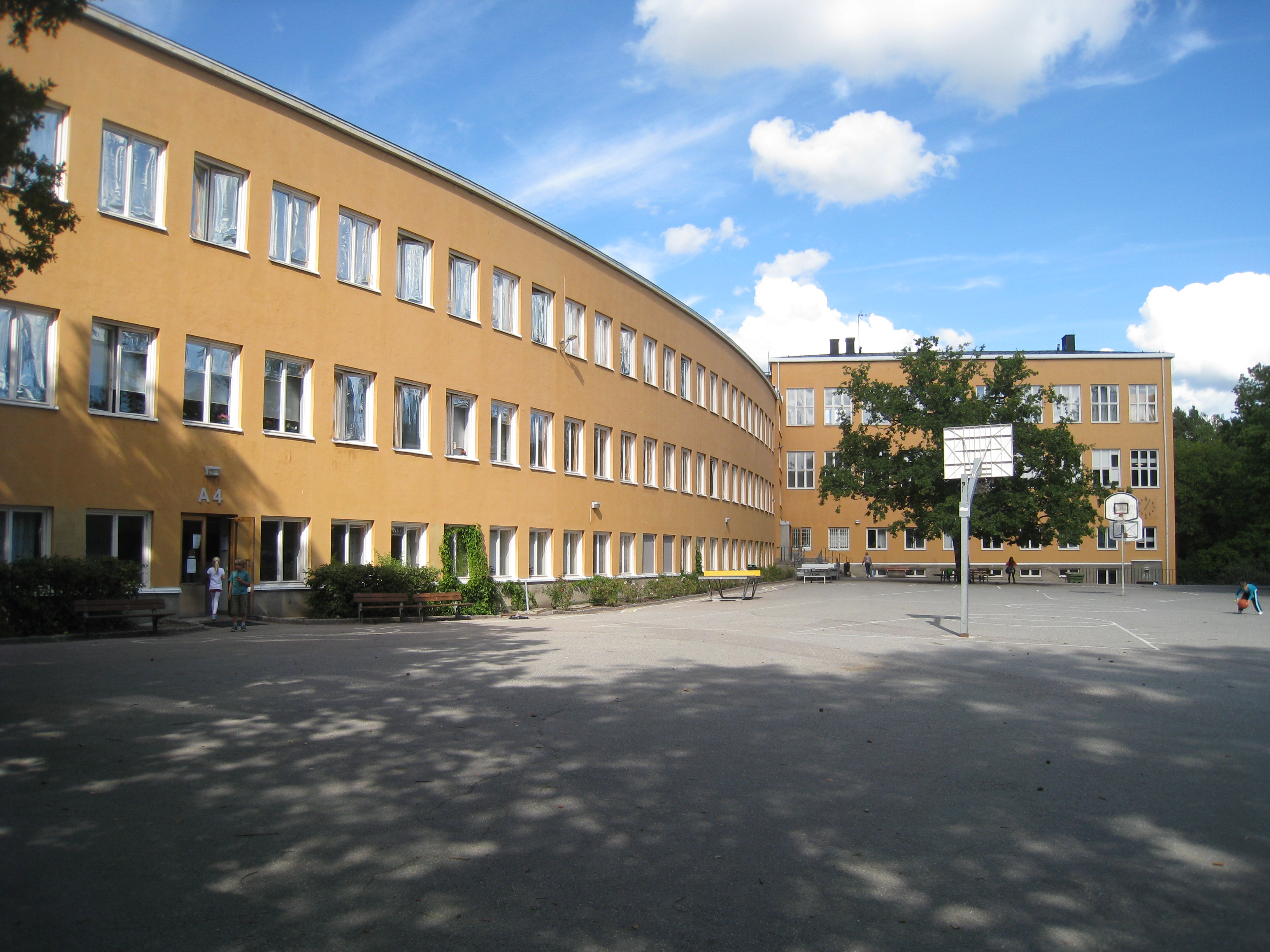 Olovslundsskolan på Gustav III:s väg 59-61 i Olovslund, Bromma. Skolan byggdes 1931 i en svängd form och ritades av arkitekt Paul Hedqvist (1895-1977). Huvudbyggnaden är svängd utmed Åkerslundsgatan med en radie på 150 meter.